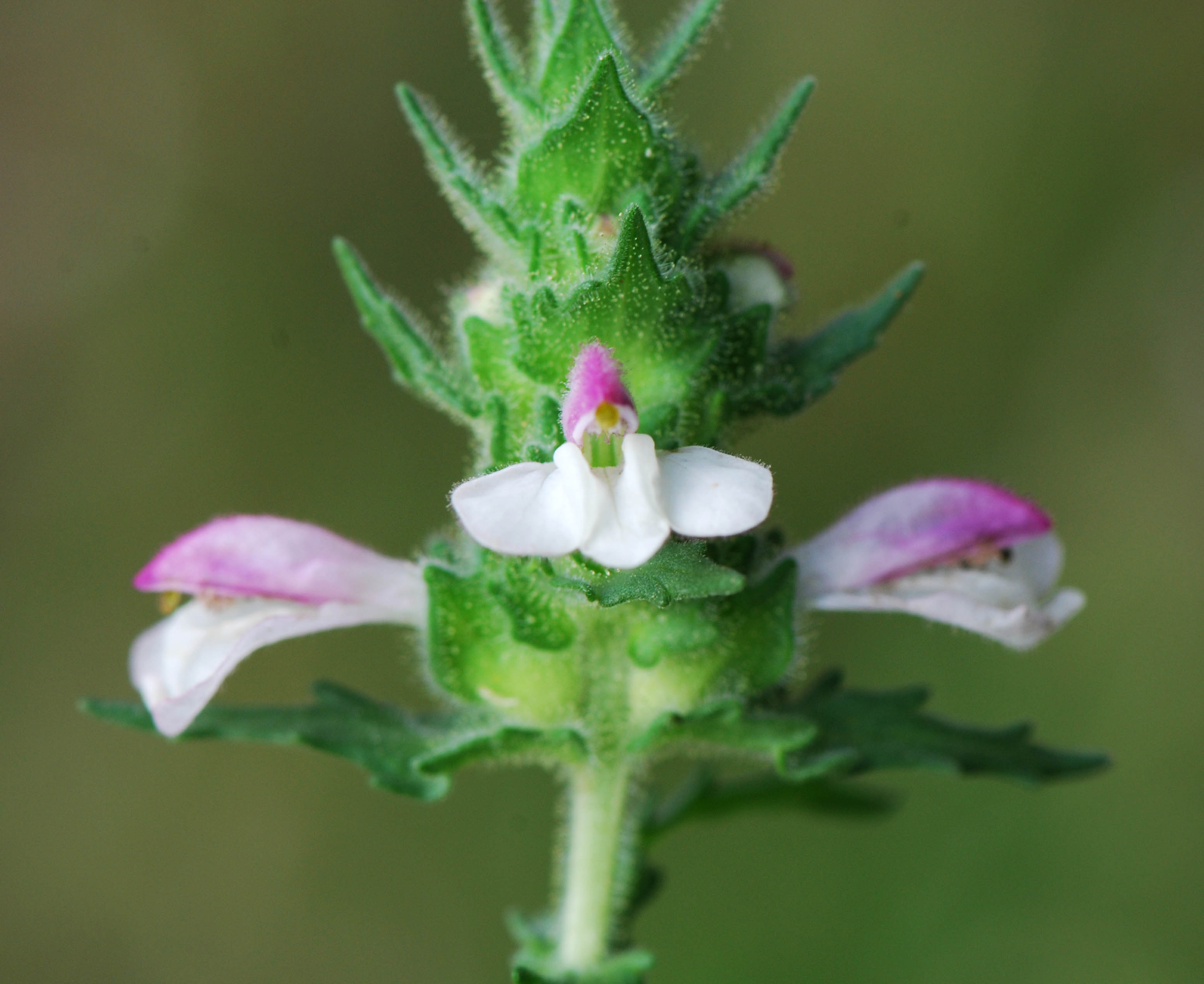 Bartsia trixago, Bartsie trixago, Monacia, Corse